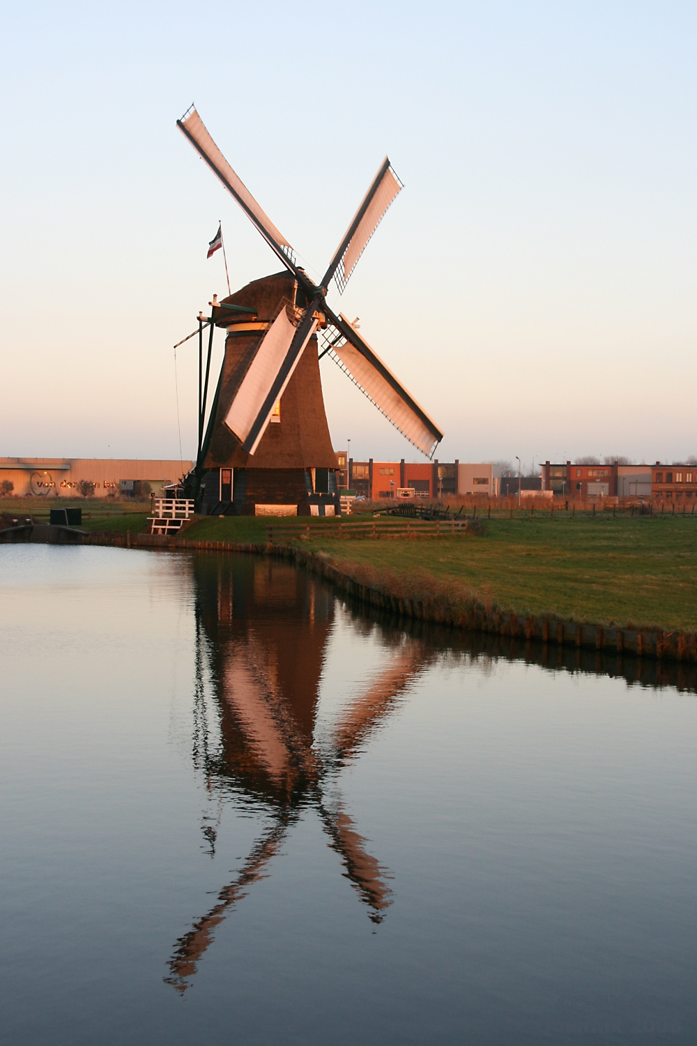 Uitgeest: molen De Kat met zeilen